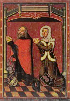 Tafelbild des Lübecker Ratsherrn Segebodo II Crispin (+ 1388) und seiner Ehefrau Elisabeth Morneweg